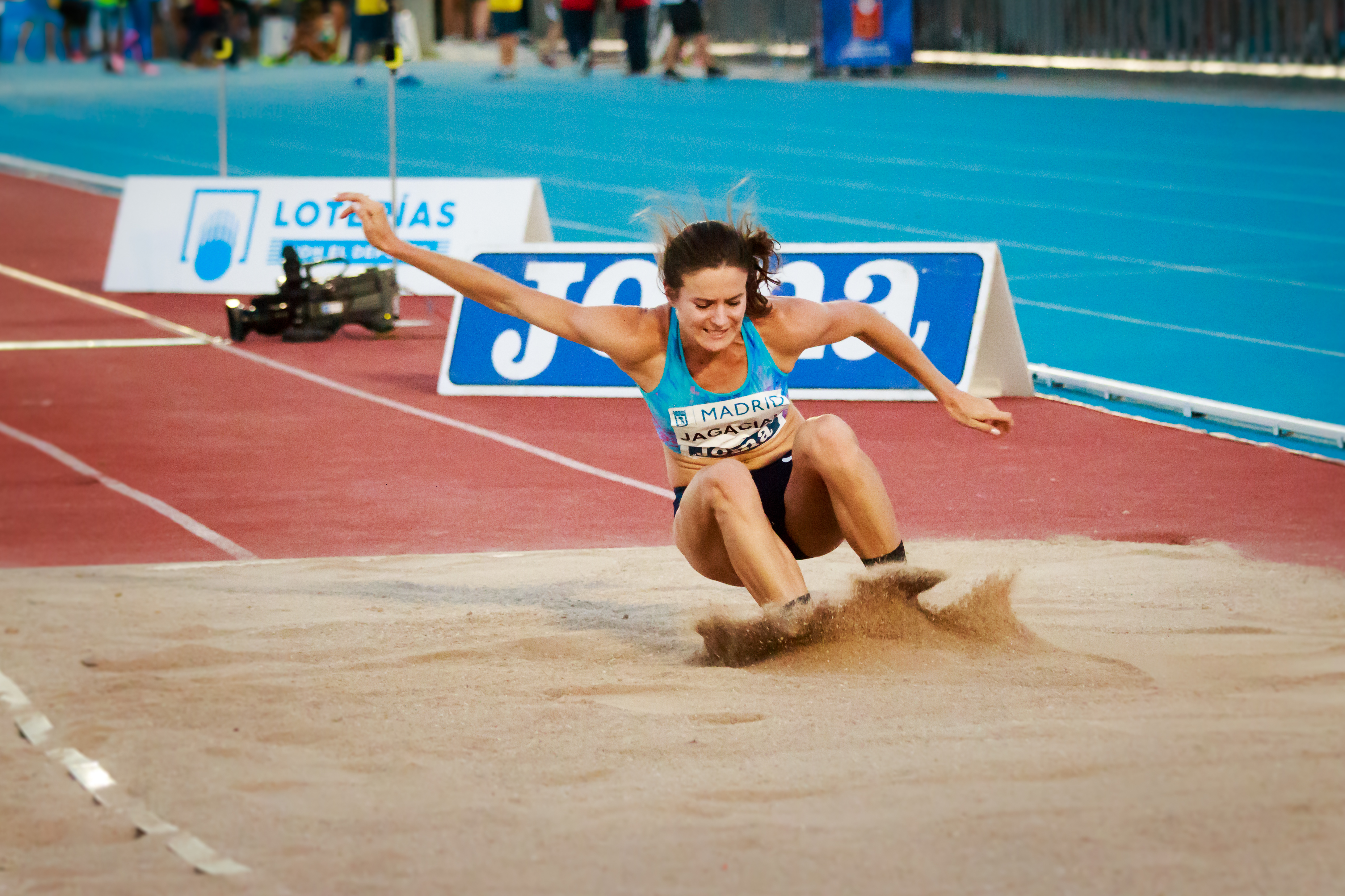 Anna Jagaciak-Michalska (POL). Triple salto. IAAF World Challenge. Meeting Madrid 2017. Moratalaz, Madrid.